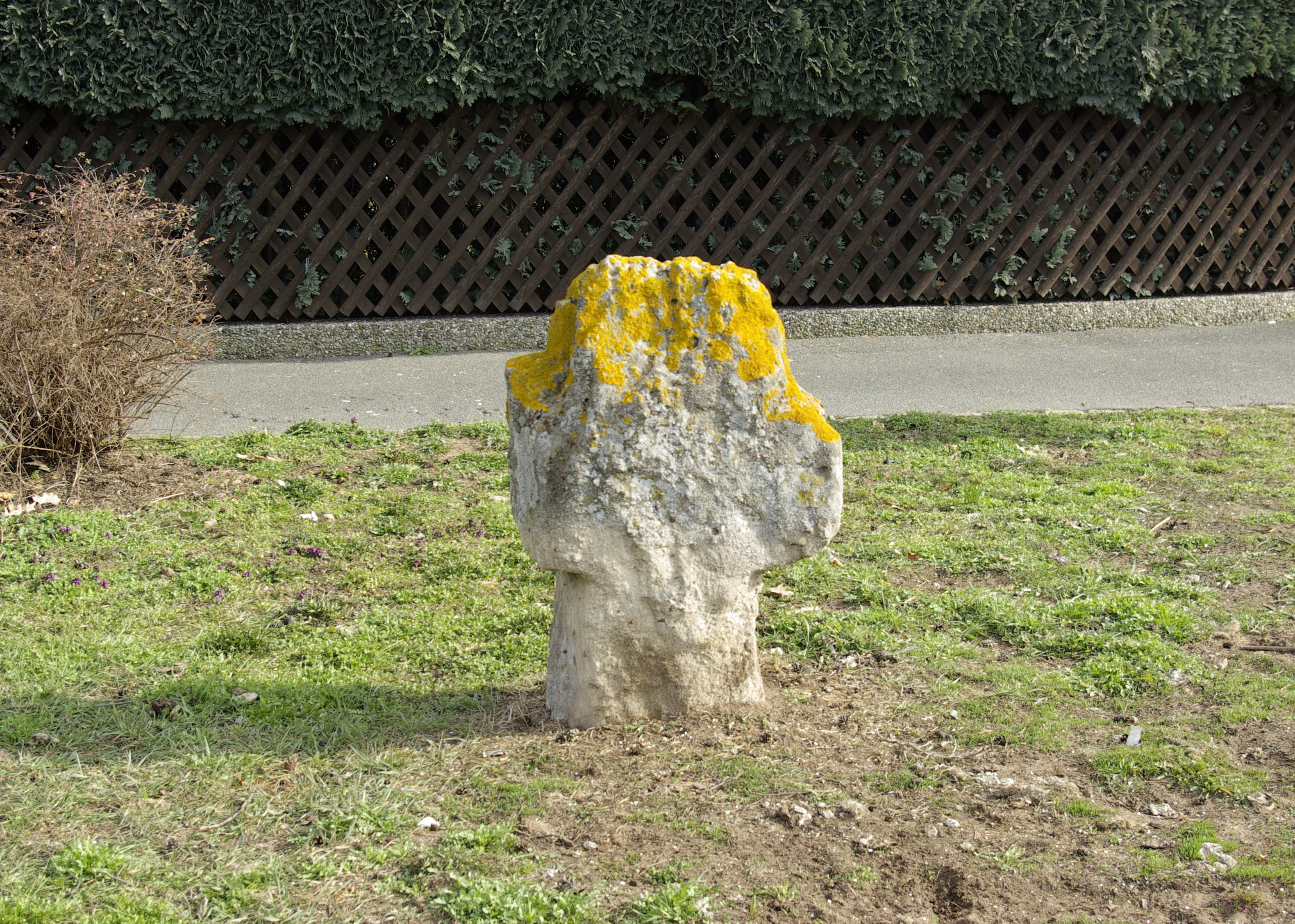 Steinkreuz Theodor-Heuss-Straße / Alfred-Nobel-Straße im Fürther Stadtteil Stadeln.